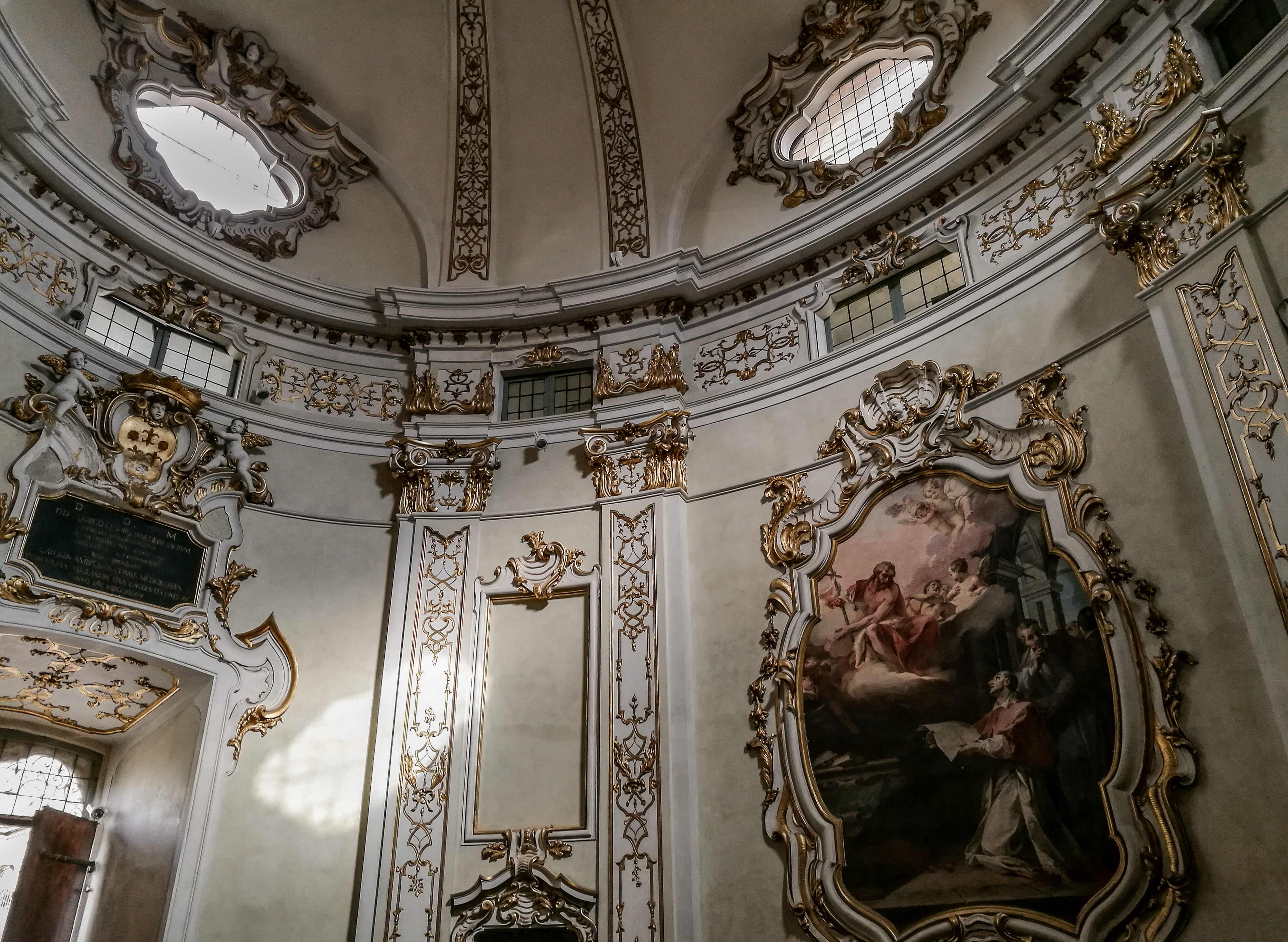 Palazzo Mezzabarba This is a photo of a monument which is part of cultural heritage of Italy.